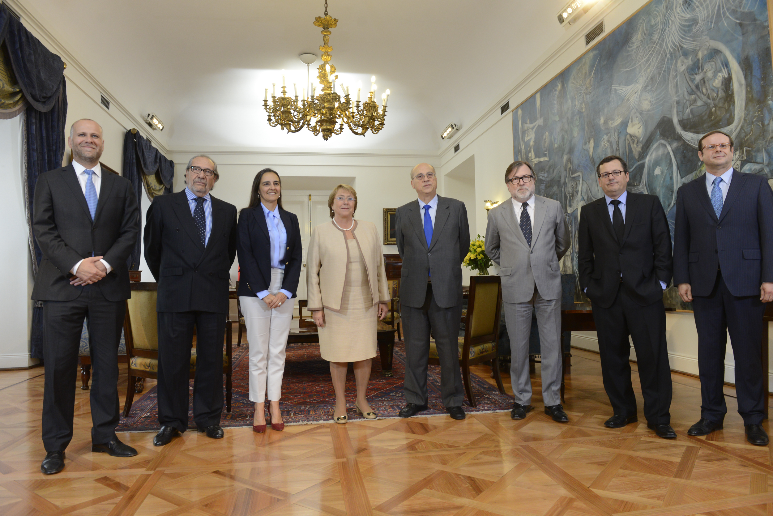 La presidenta chilena Michelle Bachelet recibe a los miembros de la Asociación Nacional de Televisión (Anatel). El primero de izquierda a derecha es Álvaro Elizalde, entonces ministro secretario general de Gobierno; la tercera, Carmen Gloria López cuando era directora ejecutiva del canal estatal Televisión Nacional de Chile; el quinto, Ernesto Corona Bozzo, presidente de Anatel; el sexto, Jaime de Aguirre, director ejecutivo de Chilevisión.